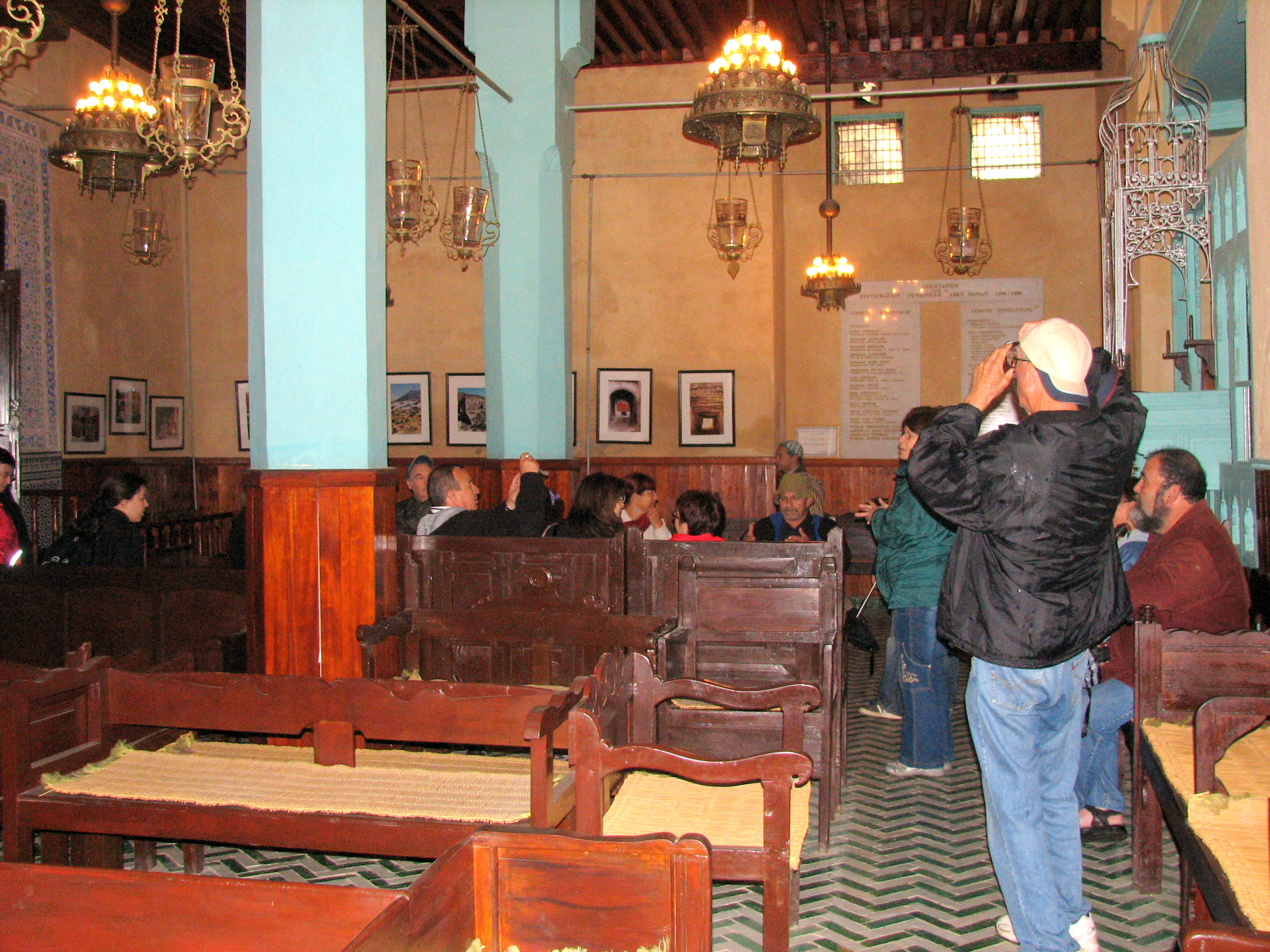 Aben Danan synagogue-Fes Morocco בית הכנסת של משפחת אבן דנאן בעיר פס במרוקו. בית לא פעיל. הפך למוזיאון בשנת 1999. מתוחזק עד היום על ידי המשפחה המוסלמית שטיפלה בו בזמן שהיה פעיל""